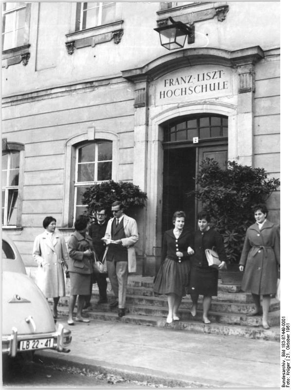 Weimar, Franz-Liszt-Hochschule Zentralbild Krüger 21.10.1961 Franz-Liszt-Ehrung in Weimar Vom 16.-23. Oktober 1961 findet in Weimar eine Festwoche anläßlich des 150. Geburtstages von Franz Liszt mit mehreren Konzerten und Vorträgen in- und ausländischer Musikwissenschaftler statt. UBz: Studenten und Gästen der Festwoche vor der Franz-Liszt-Hochschule in Weimar.